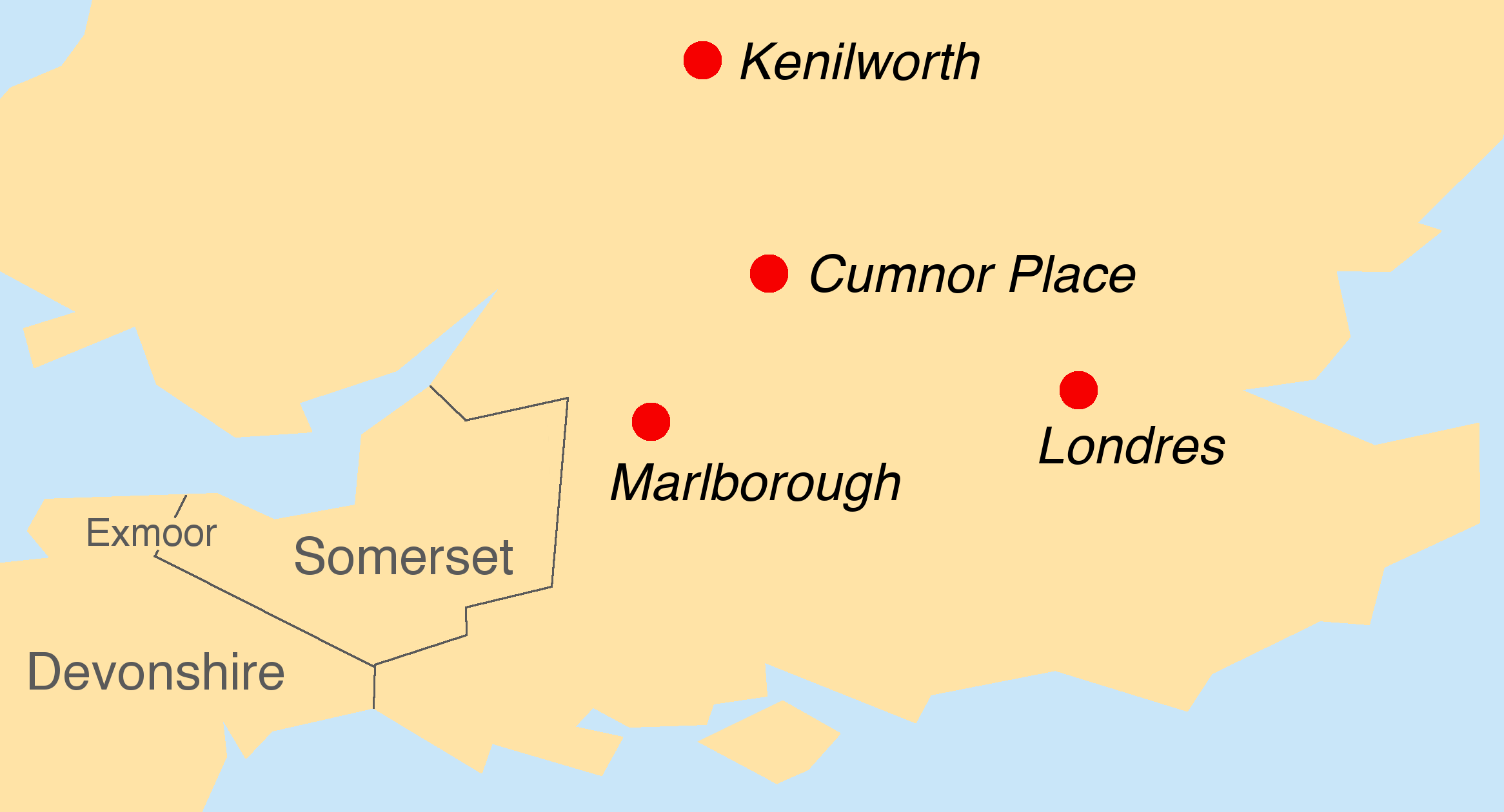 Croquis très approximatif situant les lieux de l'action du roman de Walter Scott, Kenilworth. Tracé des côtes est d'après EnglandAdminCountiesNumbered.png de Cruccone, 2005. Tracé des côtes ouest d'après Map of the administrative geography of the United Kingdom.png de Chumwa, 2015.